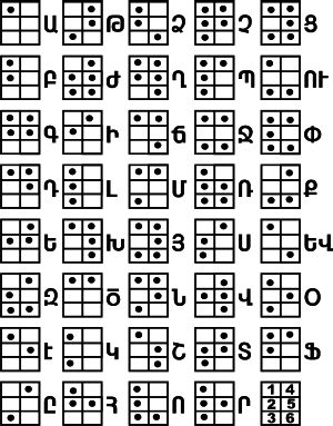 Բրայլյան այբուբեն